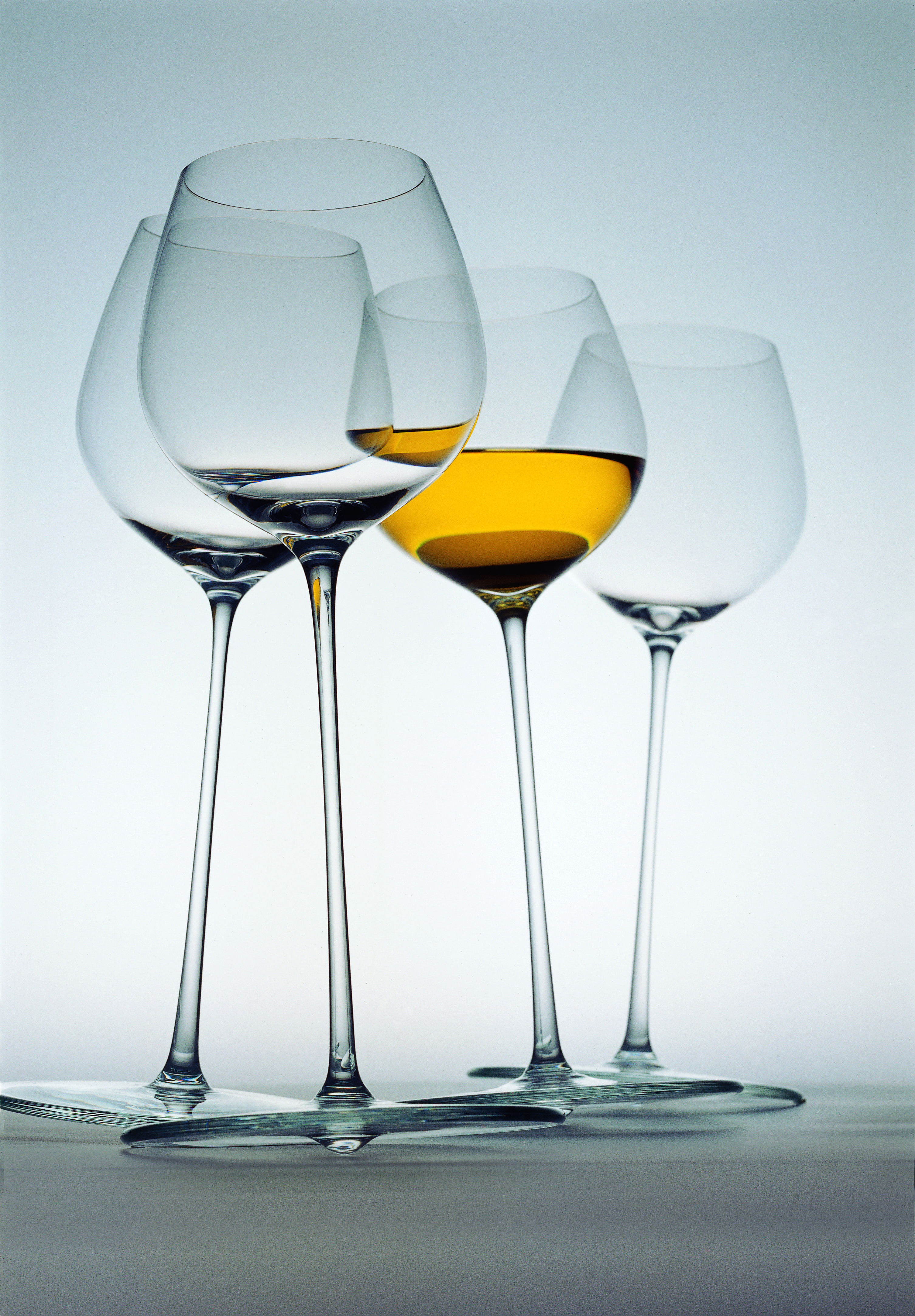 Kinetická nápojová súprava z roku 2002 (LR 3350)_autor Patrik Illo